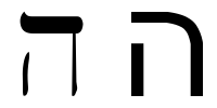 hebrew letter he